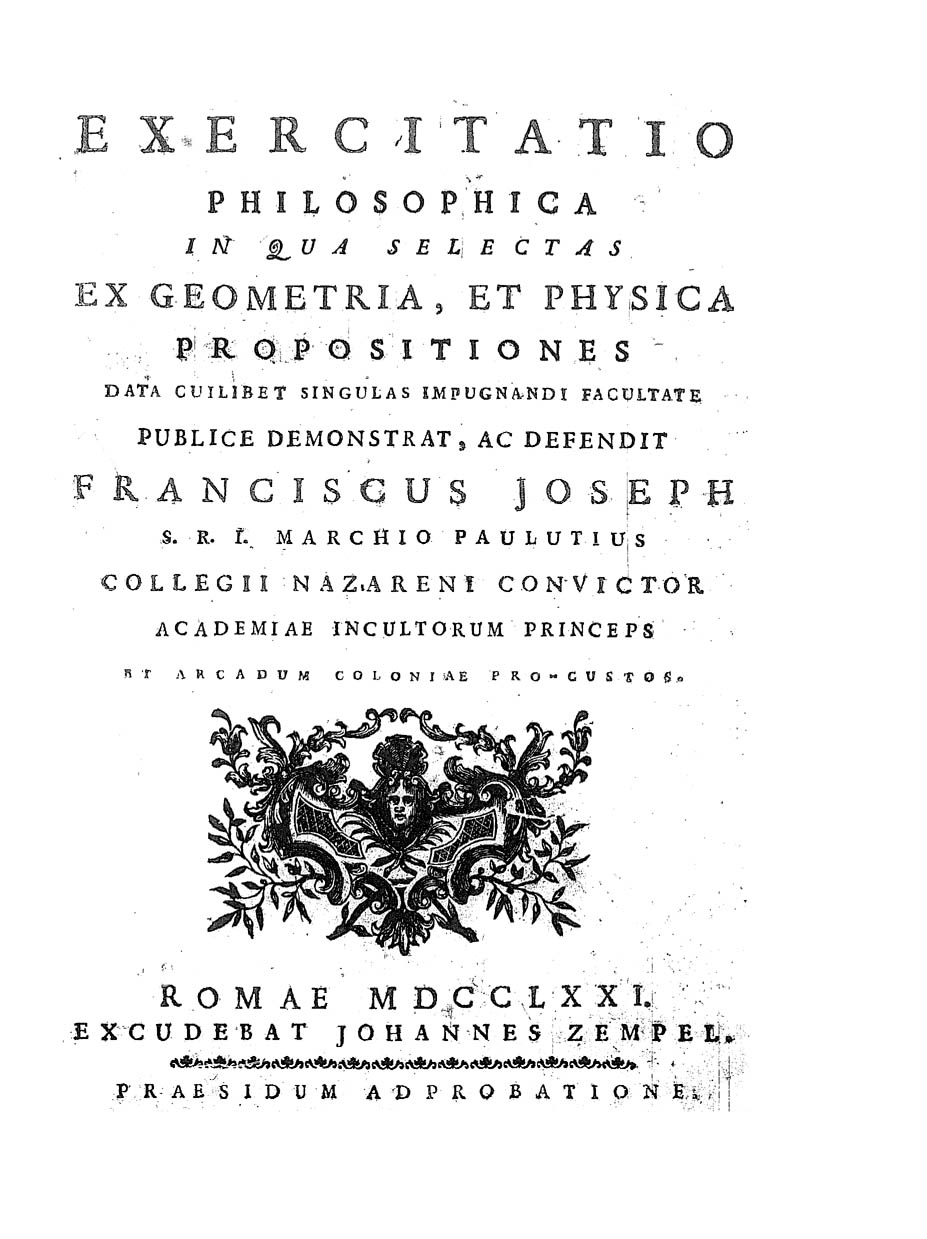 Exercitatio philosophica in qua selectas ex geometria, et physica propositiones data cuilibet singulas impugnandi facultate publice demonstrat, ac defendit Franciscus Joseph s.r.i. marchio Paulutius Collegi Nazareni convictor .... - Romae : excudebat Johannes Zempel, 1771. - 31, [1] p., IIII c. di tav. : ill. calcografiche ; 4º .